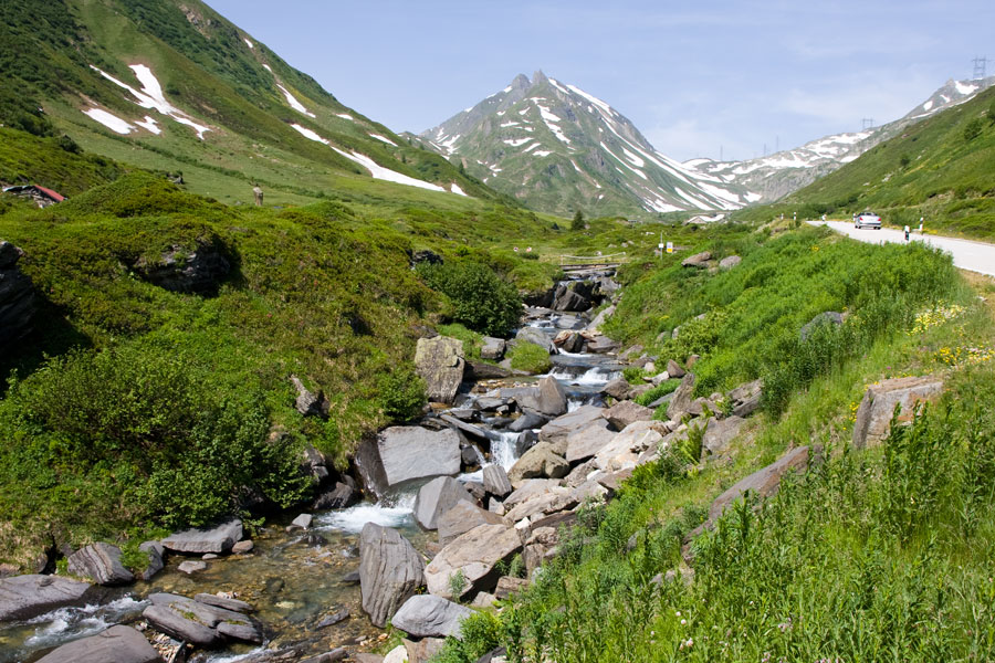 Il fiume Ticino appena formato poco sotto il passo della Novena (Nufenenpass)